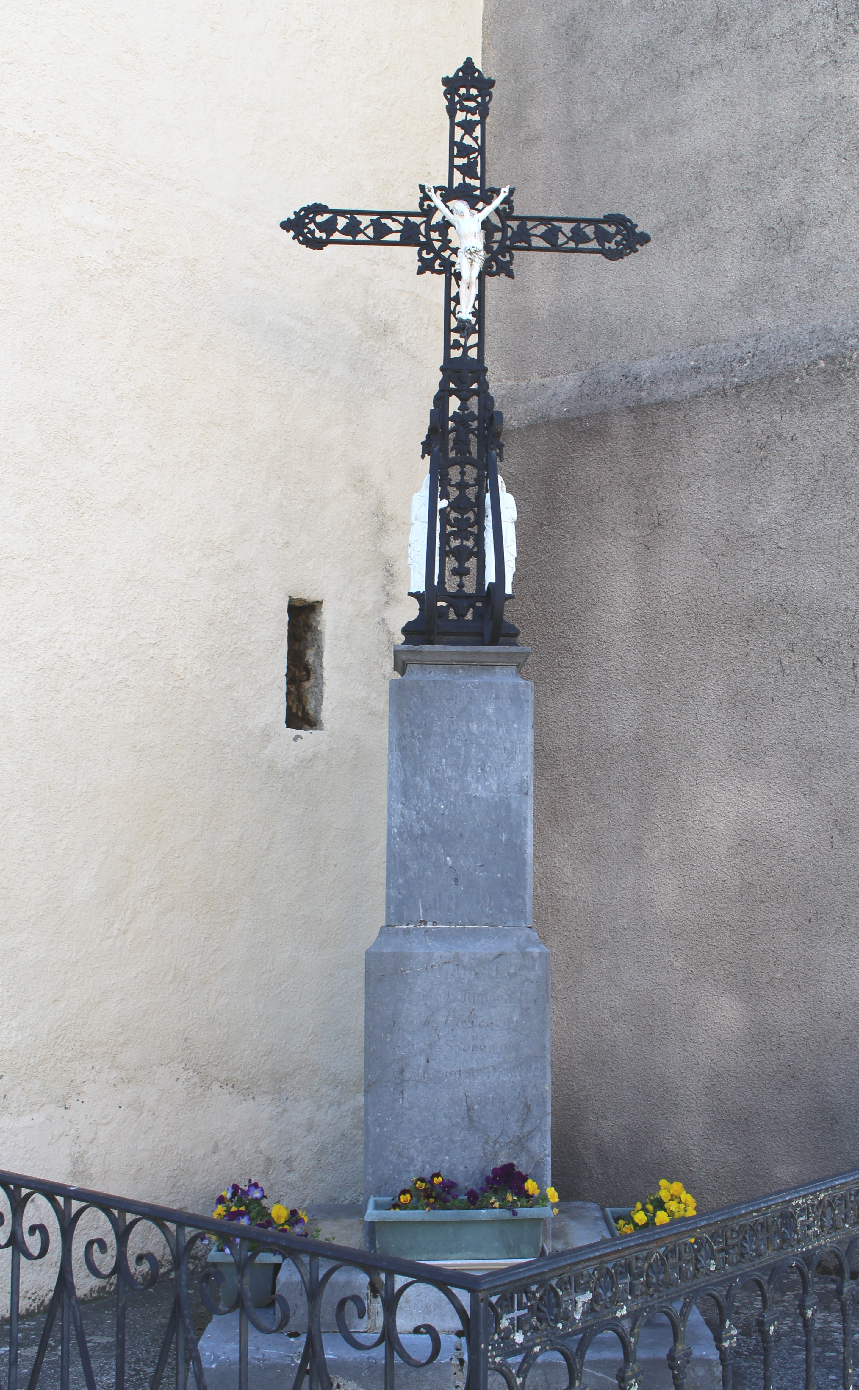 Croix de Mérilheu (Hautes-Pyrénées)